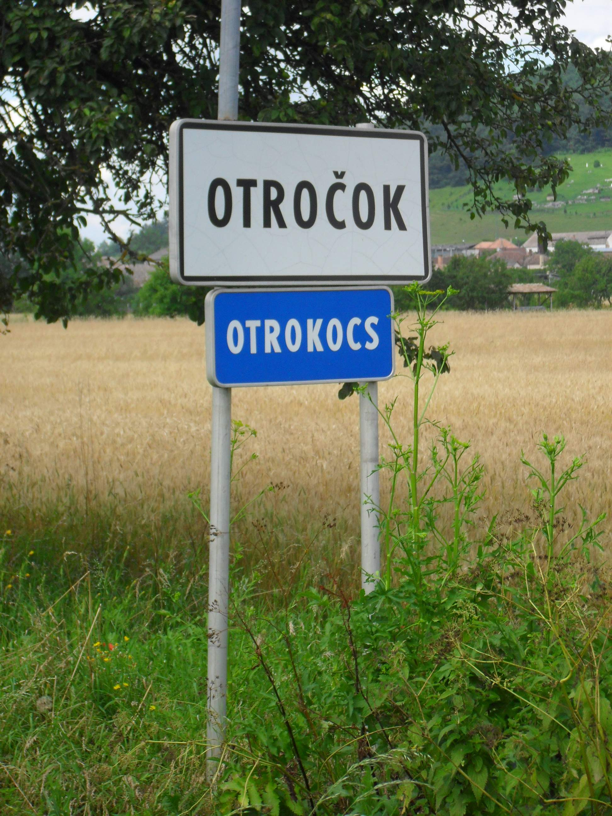 Otrokócs - kétnyelvű helységnévtábla